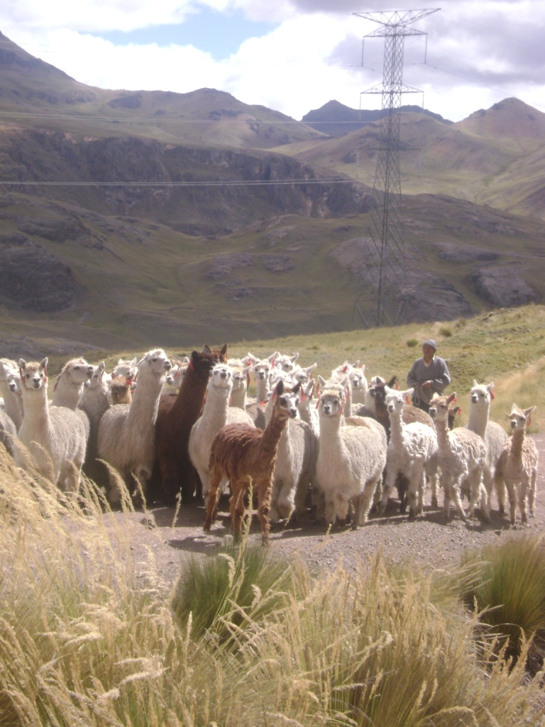 ALPACAS EN PLENA CARRETRA DE TAMBOCUCHO-LACHOCC